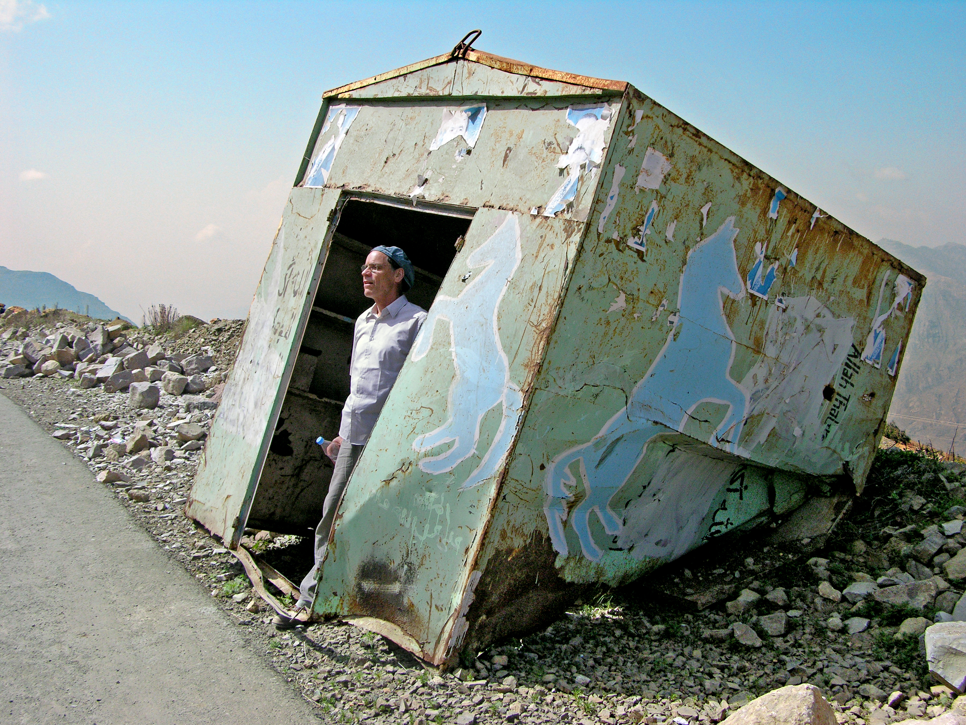 Rainer Komers Manakha 2007 schräg stehend Blechhütte